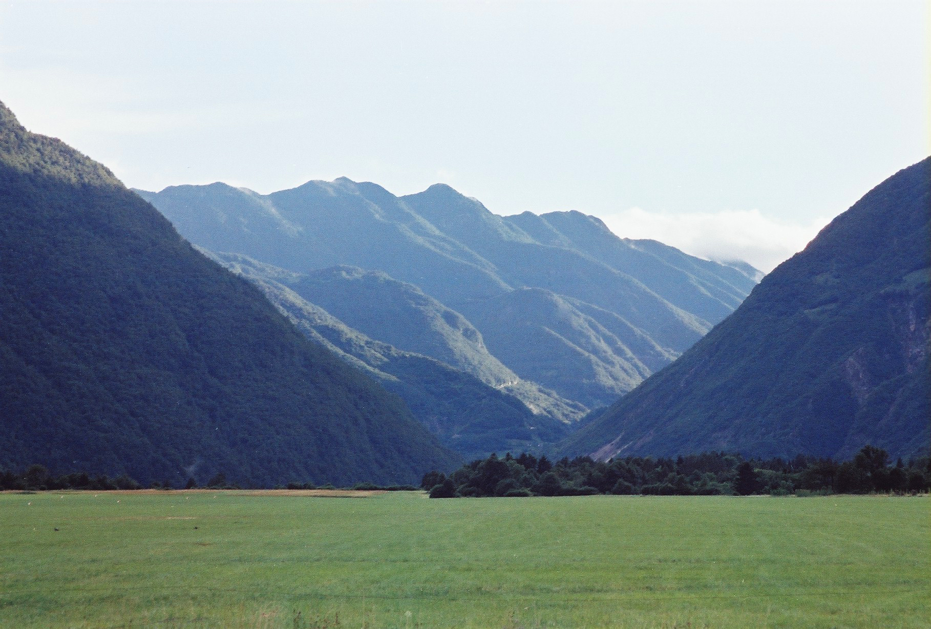 Dolina Soče v okolici Bovca, pogled proti dolini potoka Učja